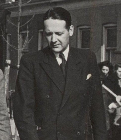 Collectie / Archief : Fotocollectie Elsevier Reportage / Serie : [ onbekend ] Beschrijving : koninklijk huis, koninginnen, bezoeken, overstromingen, herstelwerkzaamheden, burgemeesters, Juliana, koningin Datum : 25 maart 1953 Locatie : Stellendam, Zuid-Holland Trefwoorden : bezoeken, burgemeesters, herstelwerkzaamheden, koninginnen, koninklijk huis, overstromingen Persoonsnaam : Juliana, koningin Fotograaf : Fotograaf Onbekend / Anefo Auteursrechthebbende : Nationaal Archief Materiaalsoort : Foto (zwart/wit) Nummer archiefinventaris : bekijk toegang 2.24.05.02 Bestanddeelnummer : 014-1274